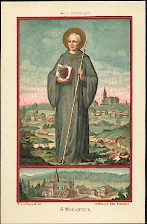 St. Morandus, Lithografie